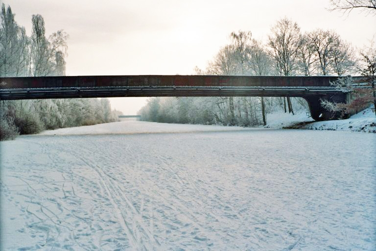 Vereister Kanal in Burghausen